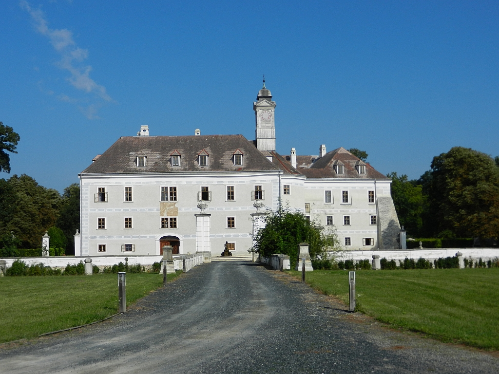 Das Schloss Ebergassing. Das Gelände ist der Öffentlichkeit nicht zugänglich. Besichtigungen sind nicht möglich. Die Aufnahme des Fotos wurde durch einen Bewohner freundlicherweise gestattet.